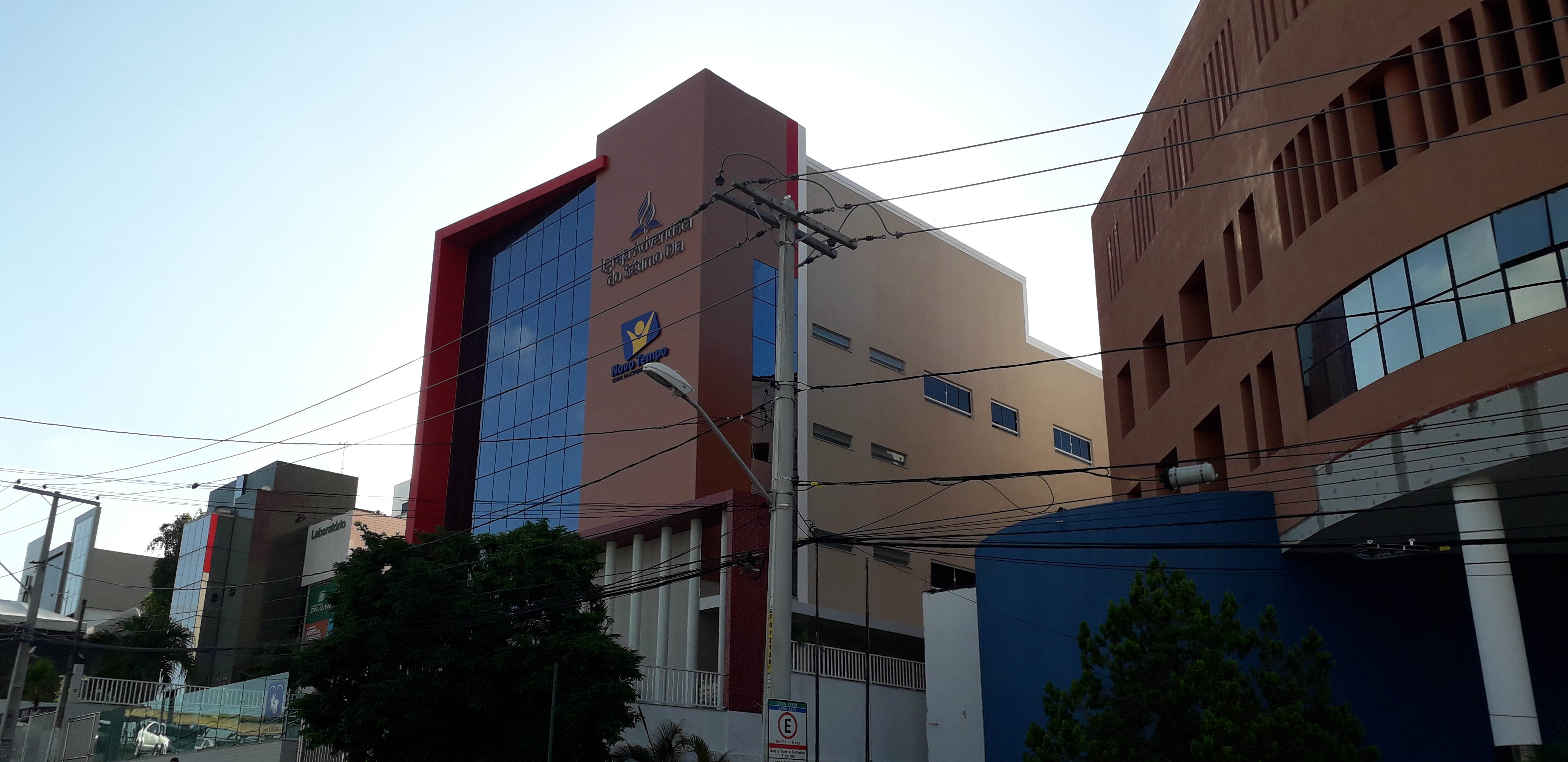 Vista externa da Igreja Adventista do bairro do Imbuí, Salvador, Bahia